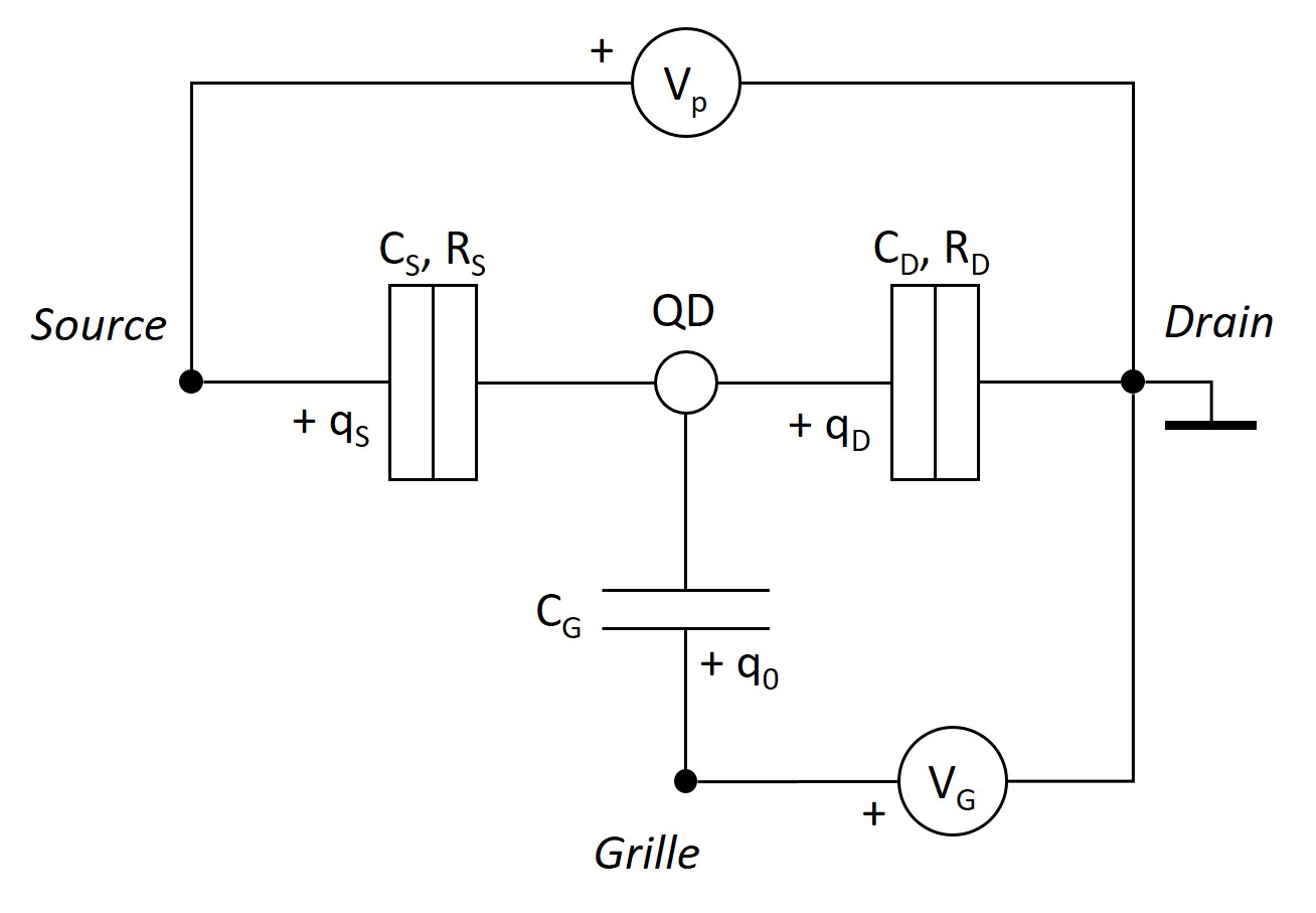 circuit set